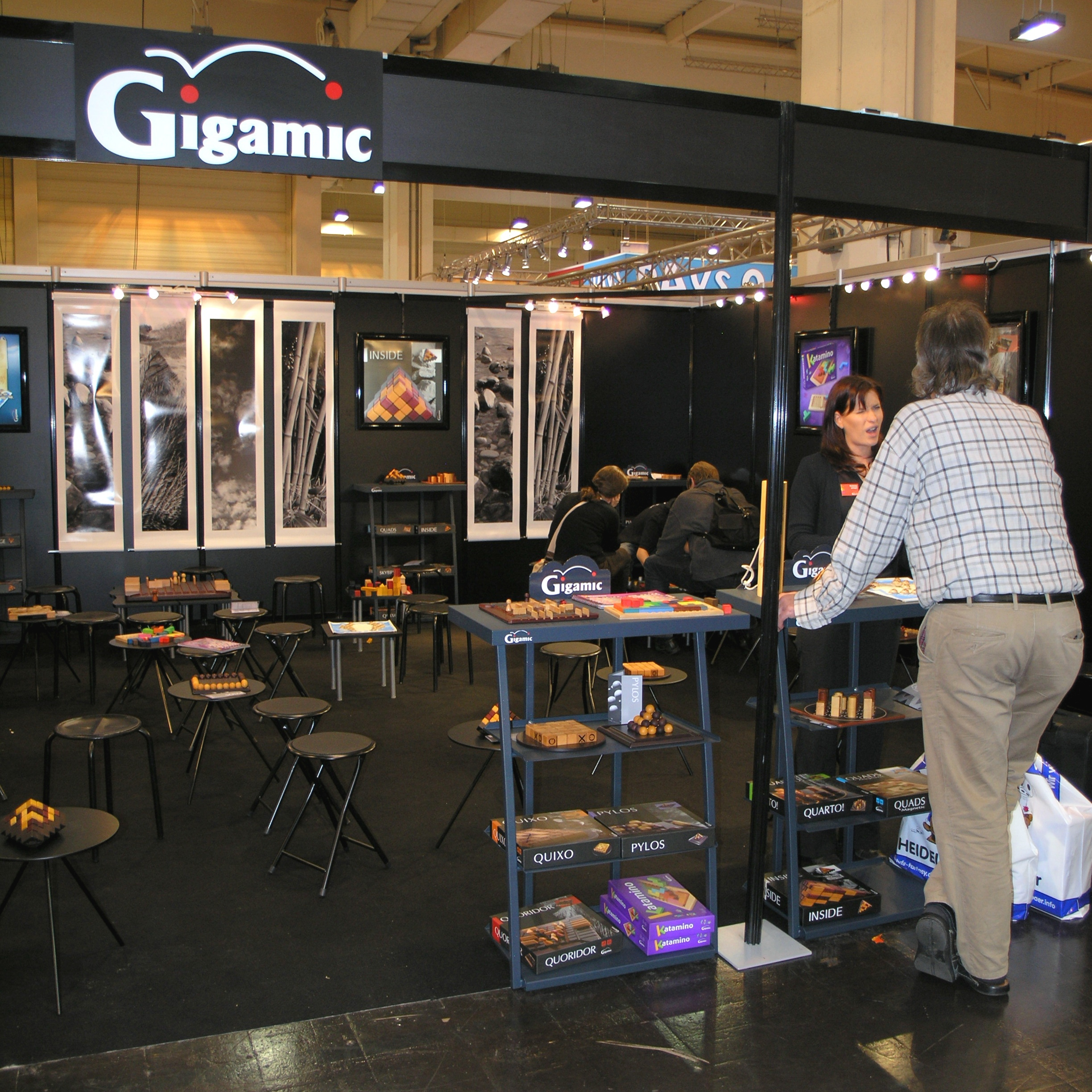 Internationalen Spieltage SPIEL 2008